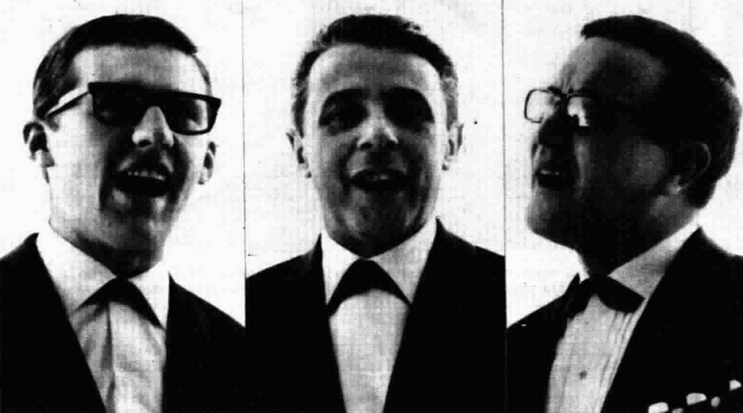 Italian musical trio Los Marcellos Ferial